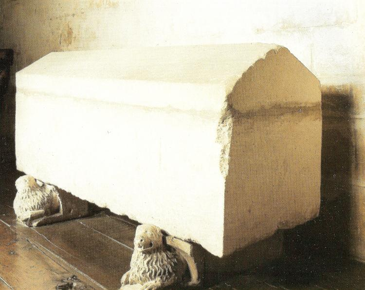 Sepulcro del rey Enrique I de Castilla. (Monasterio de las Huelgas de Burgos, España). Enrique I de Castilla fue hijo de Alfonso VIII de Castilla y de la reina Leonor de Plantagenet. Murió en su juventud, como consecuencia de una caída.